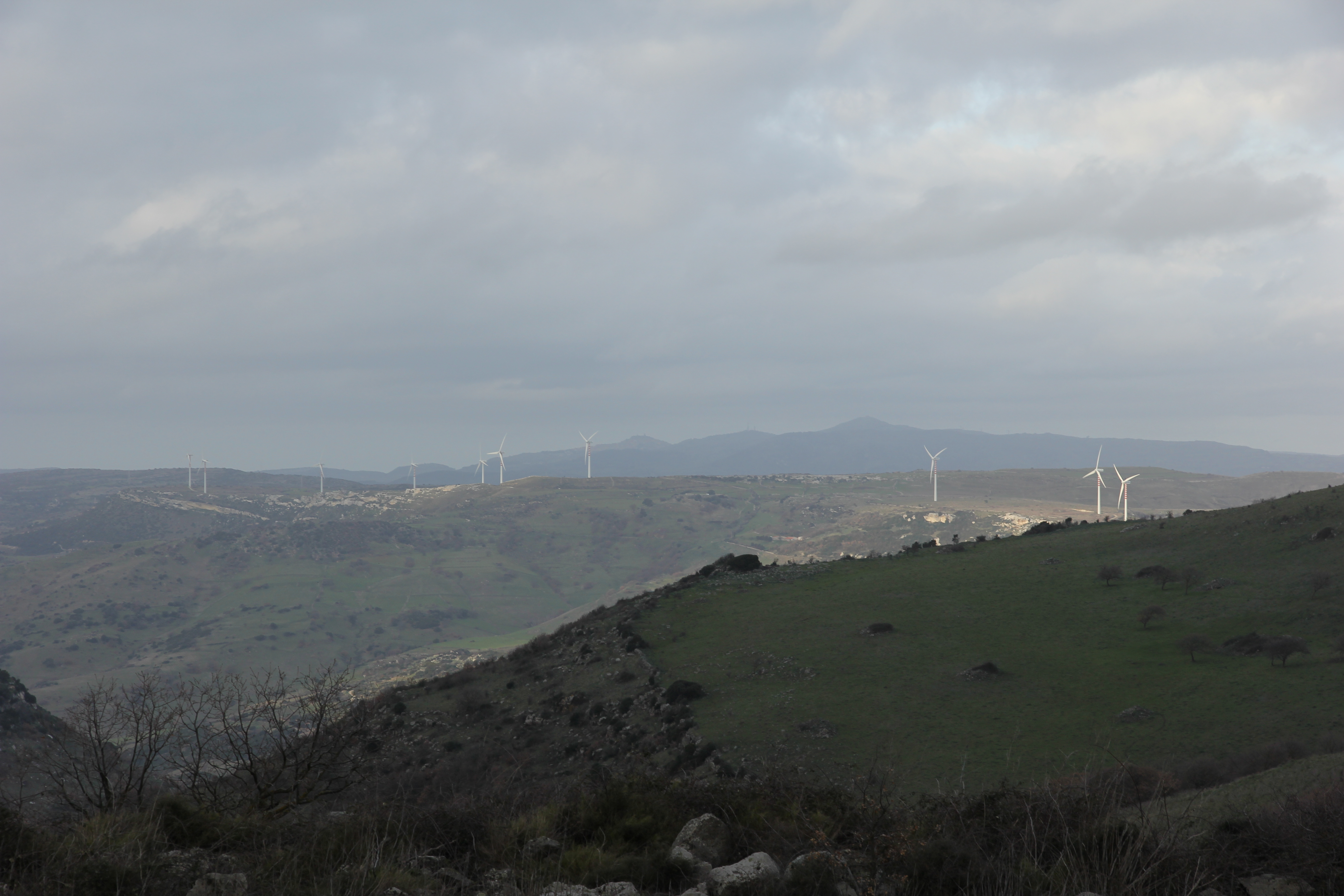 Florinas - Parco eolico